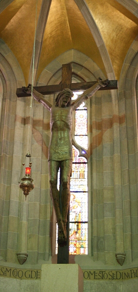 Unutrašnjost crkve Svetog Marka Evanđeliste na Markovom trgu u Zagrebu